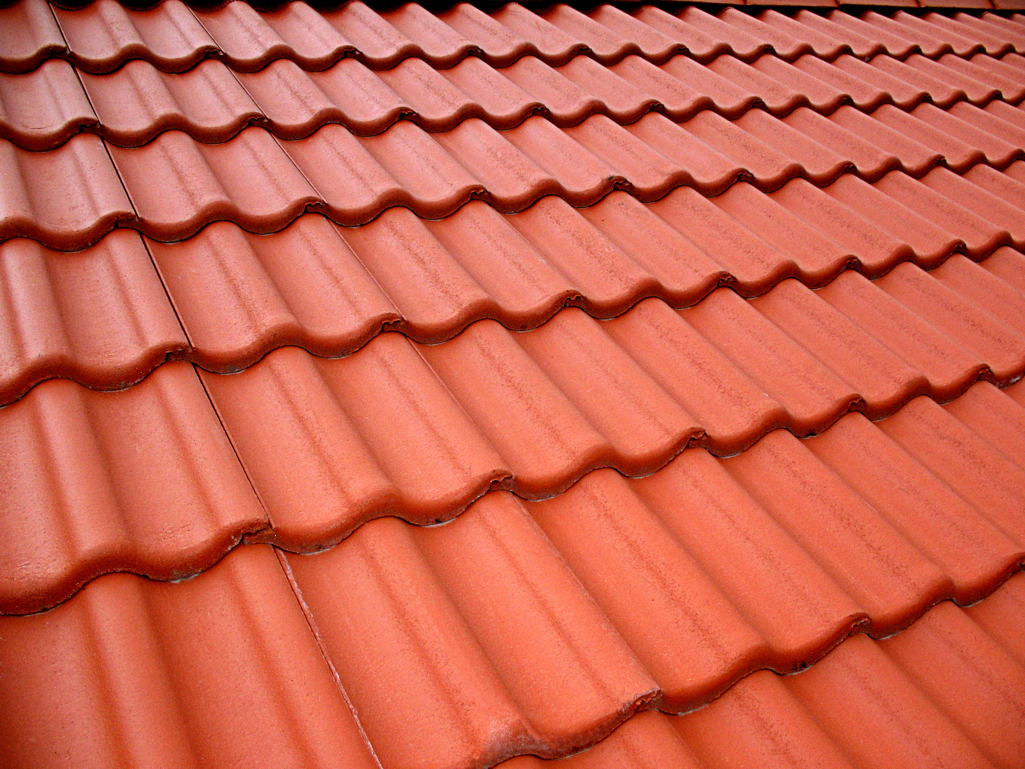 Dachtstein "Harzer Pfanne" Gesamtbild